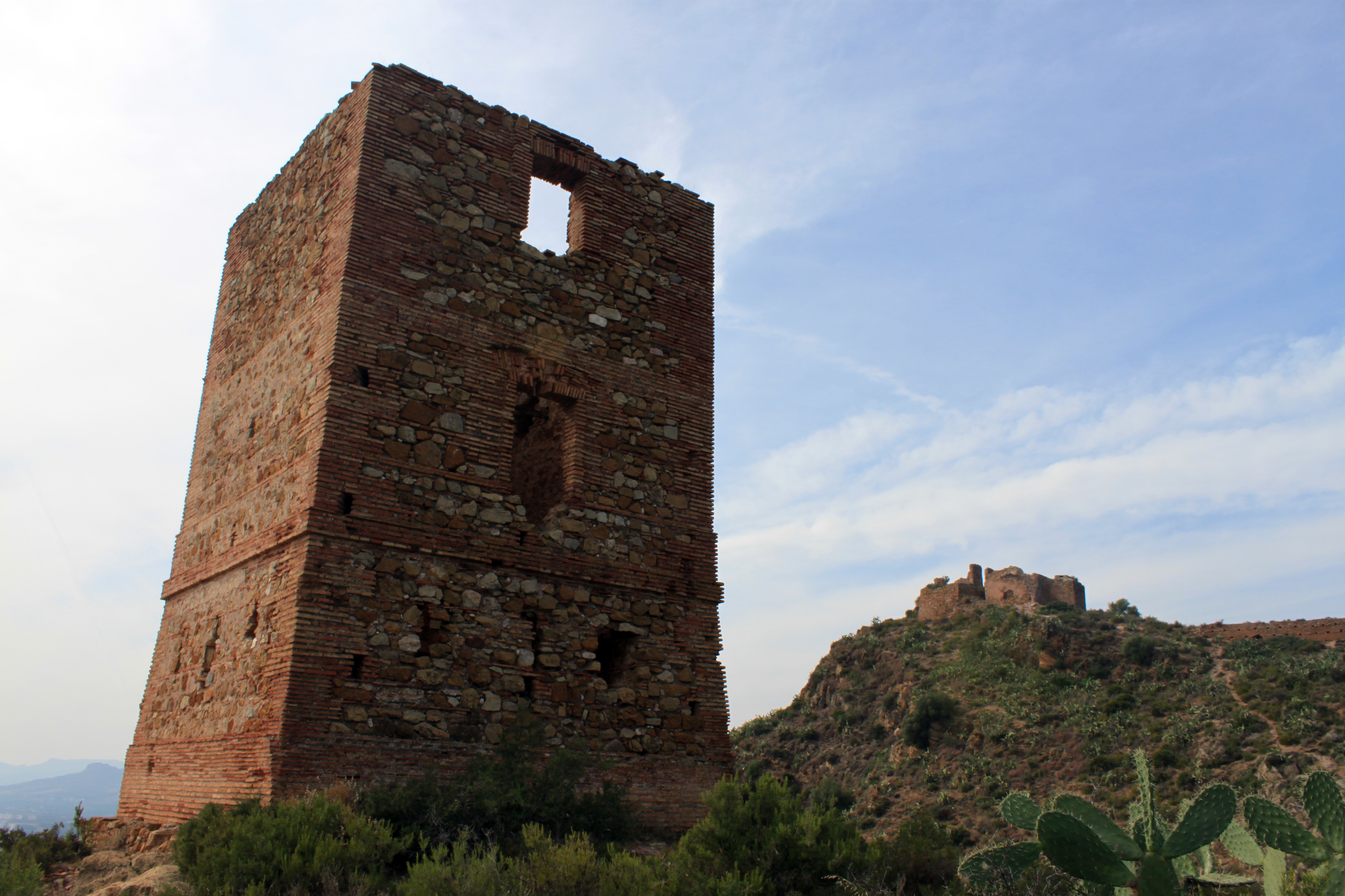 Torre de Bergamuza llamada localmente L'Agüeleta situada al este de la ladera sobre la que se asienta el castillo de Almenara. Almenara, provincia de Castellón, Comunidad Valenciana. Aunque la construcción original data, al menos, del siglo X remodelaciones realizadas en el siglo XIX para que sirviera de torre de telégrafos le ha dado el aspecto actual.